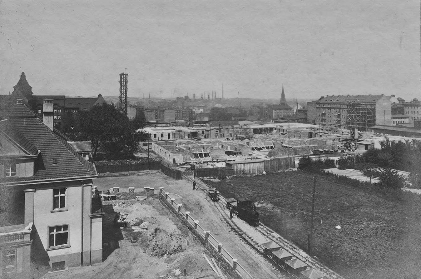 The future Sejmu Śląskiego square during construction of the building of the Sejm of Silesia, fragment of destroyed villa.